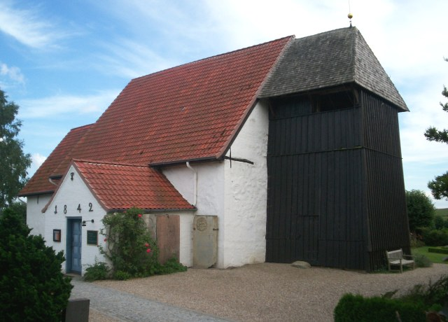 Brodersbyer Kirche